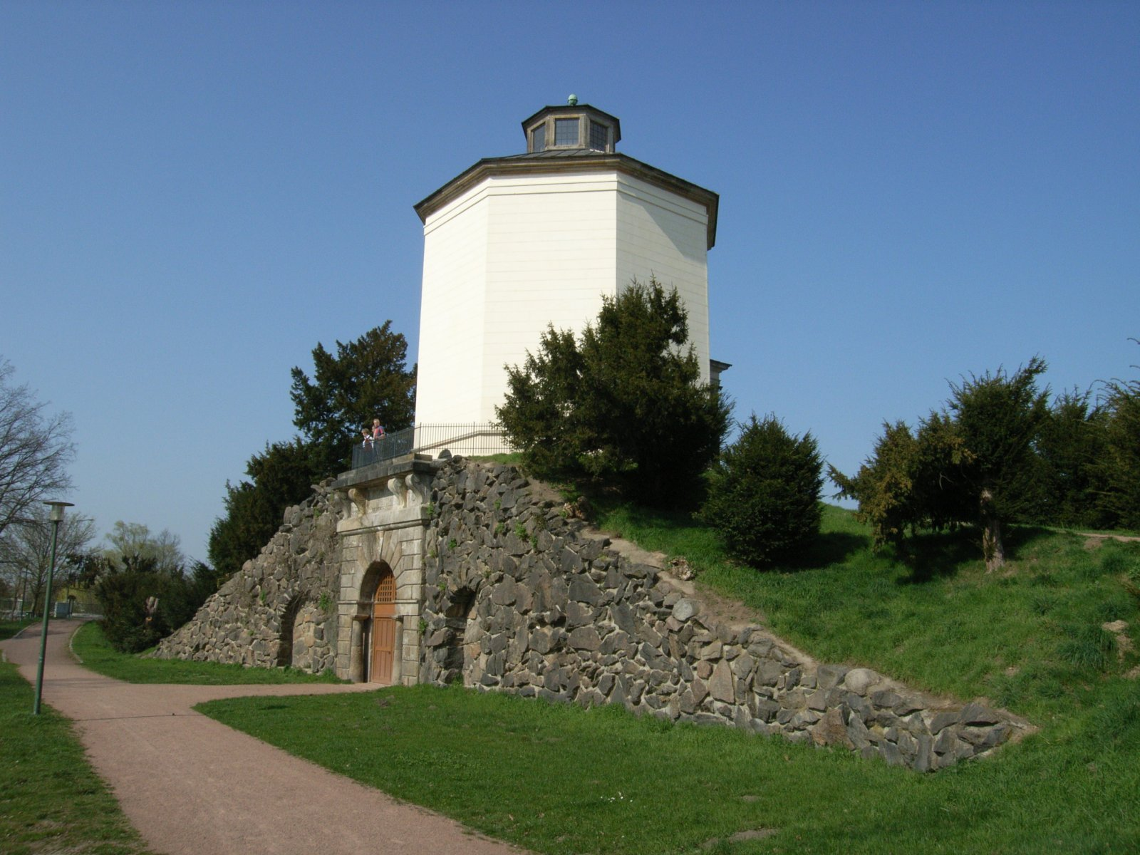 Dessau-Mildensee,Napoleonsturm (Turm der acht Winde, Loeperturm)